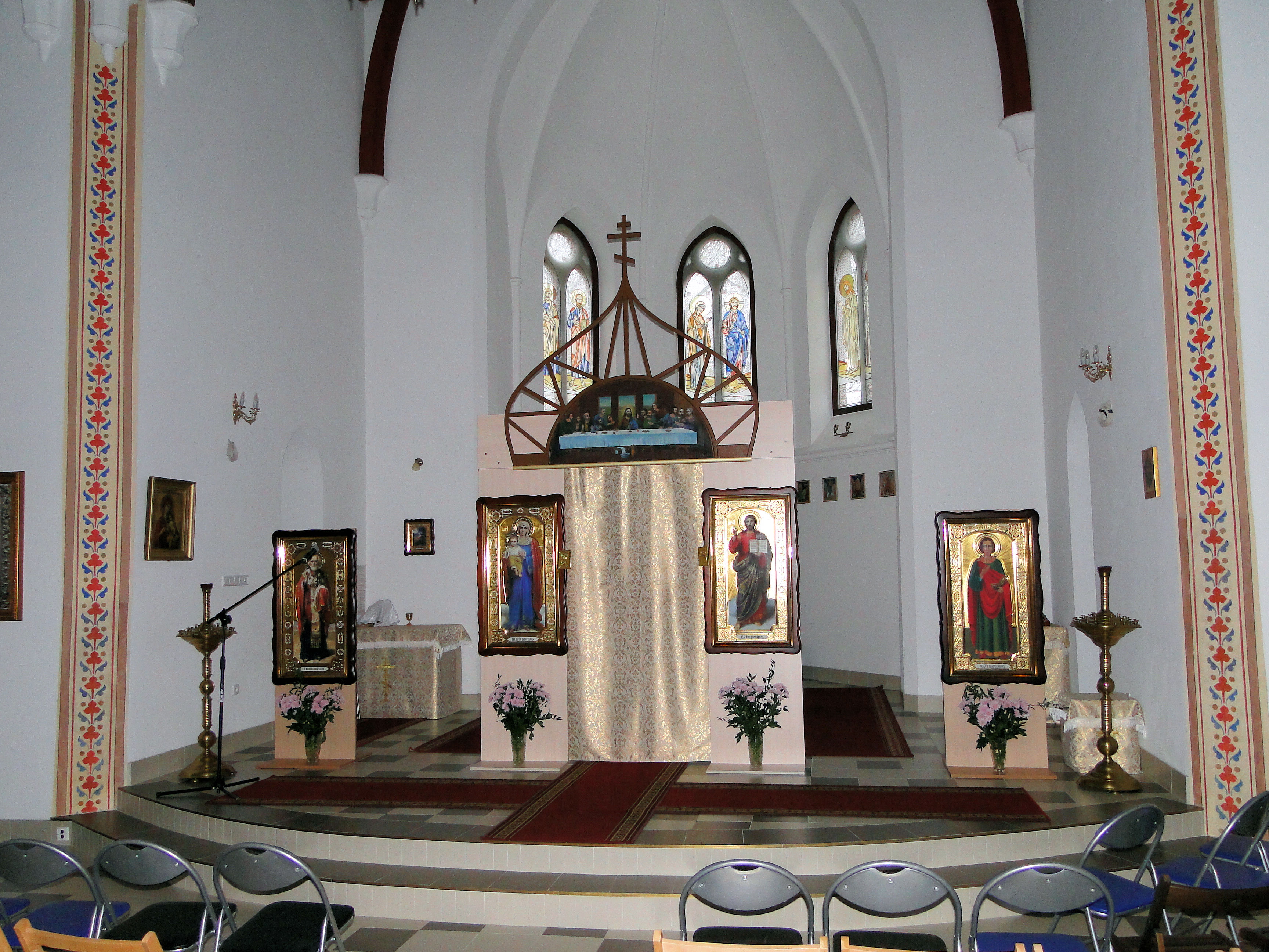 Cerkiew św. Piotra i Pawła w Stargardzie Szczecińskim